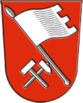 Wappen Fohnsdorf